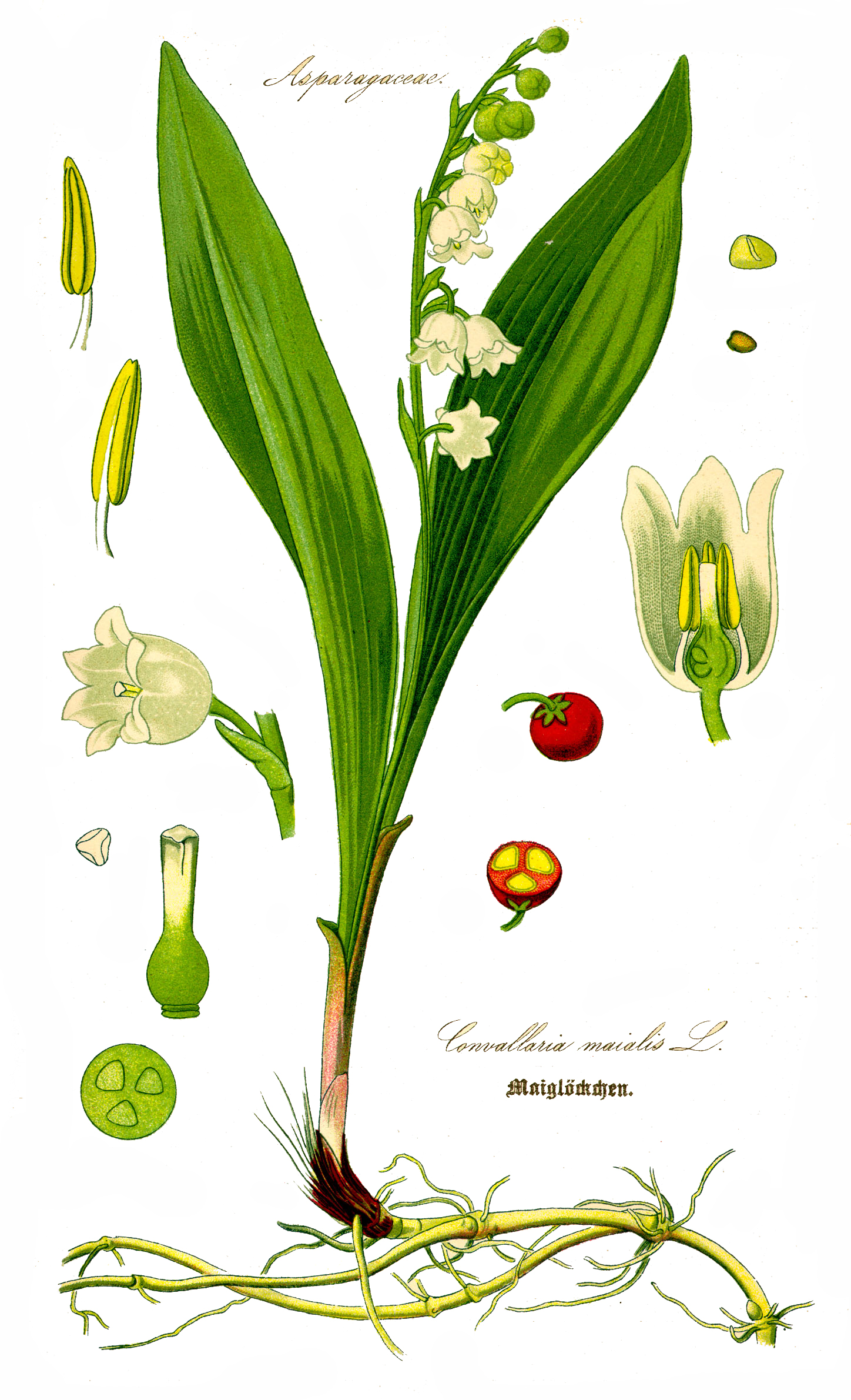 Convallaria majalis